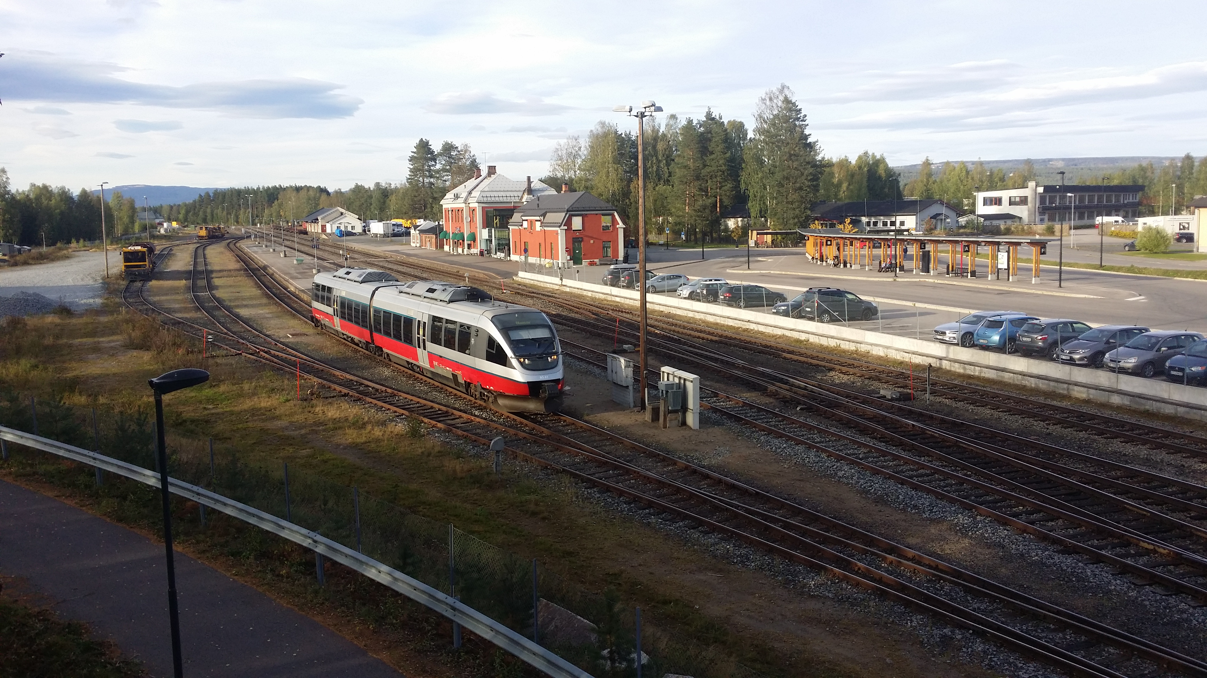 Tog på Rørosbanen, Elverum stasjon.